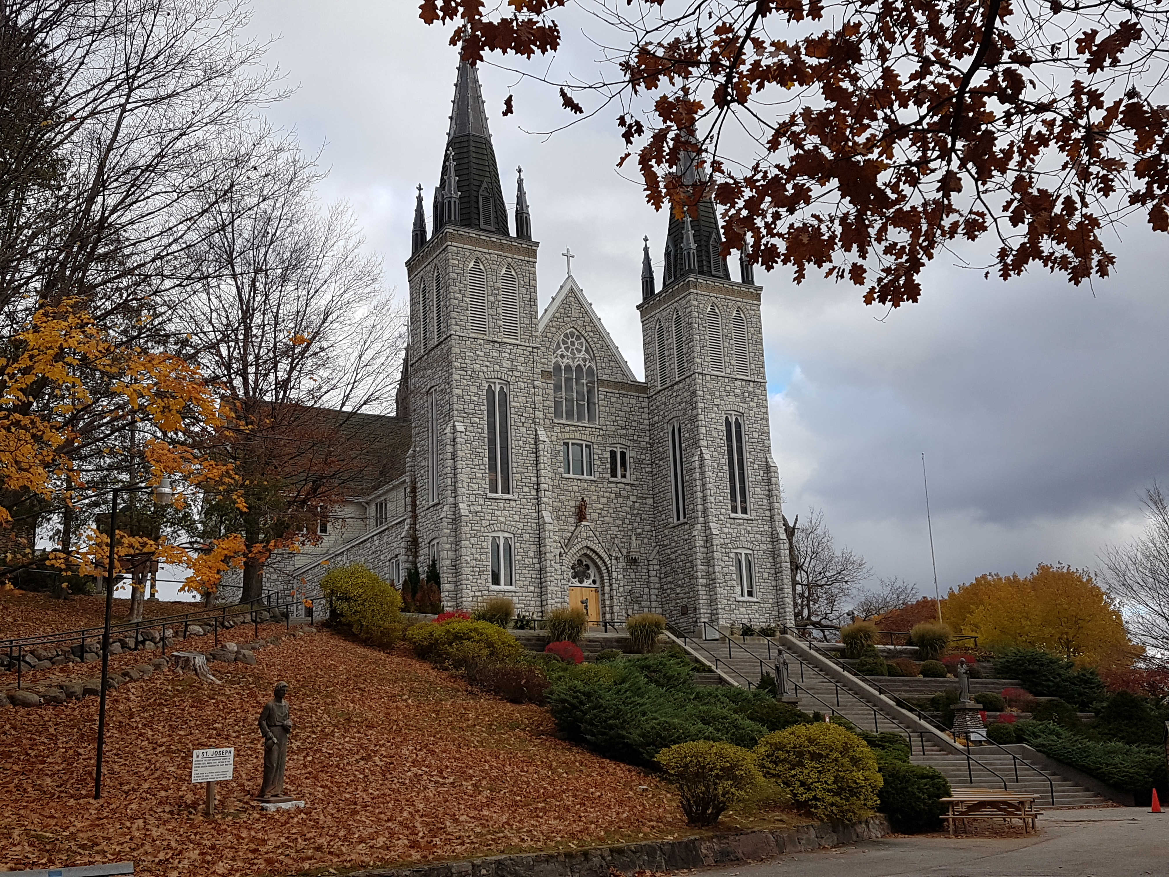 Martyr's Shrine, fall 2016